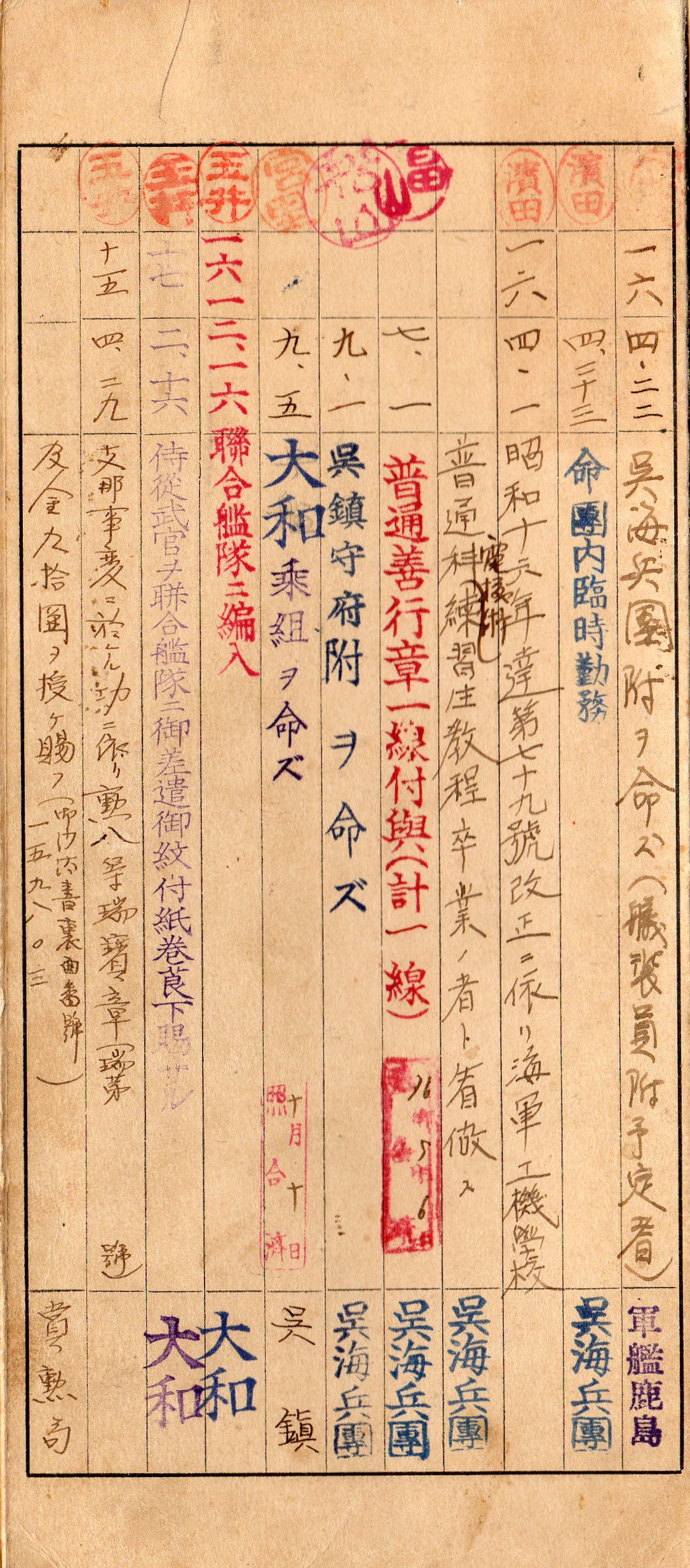 元大和乗員 三等機関兵曹所有物